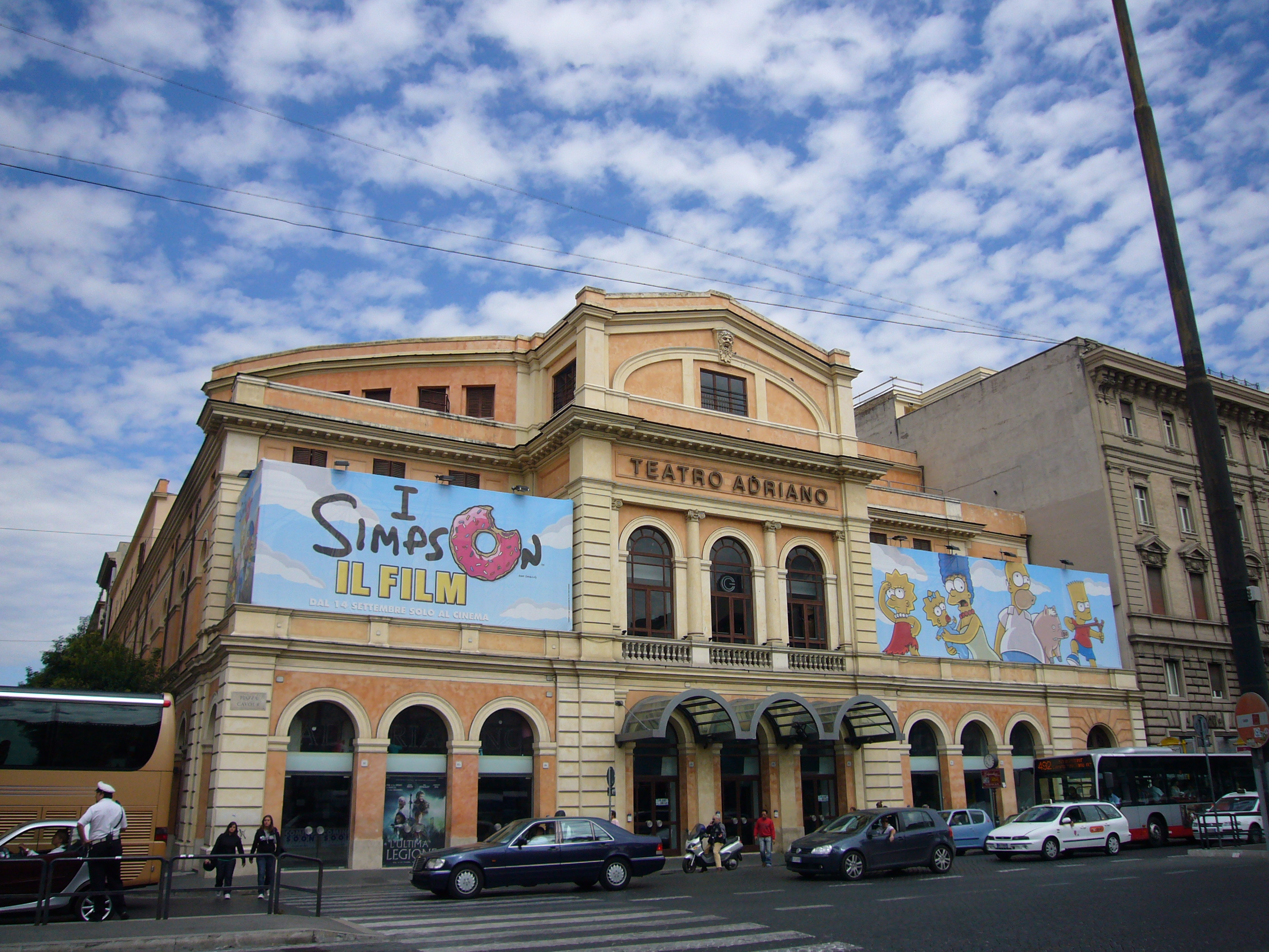 Roma, Teatro Adriano